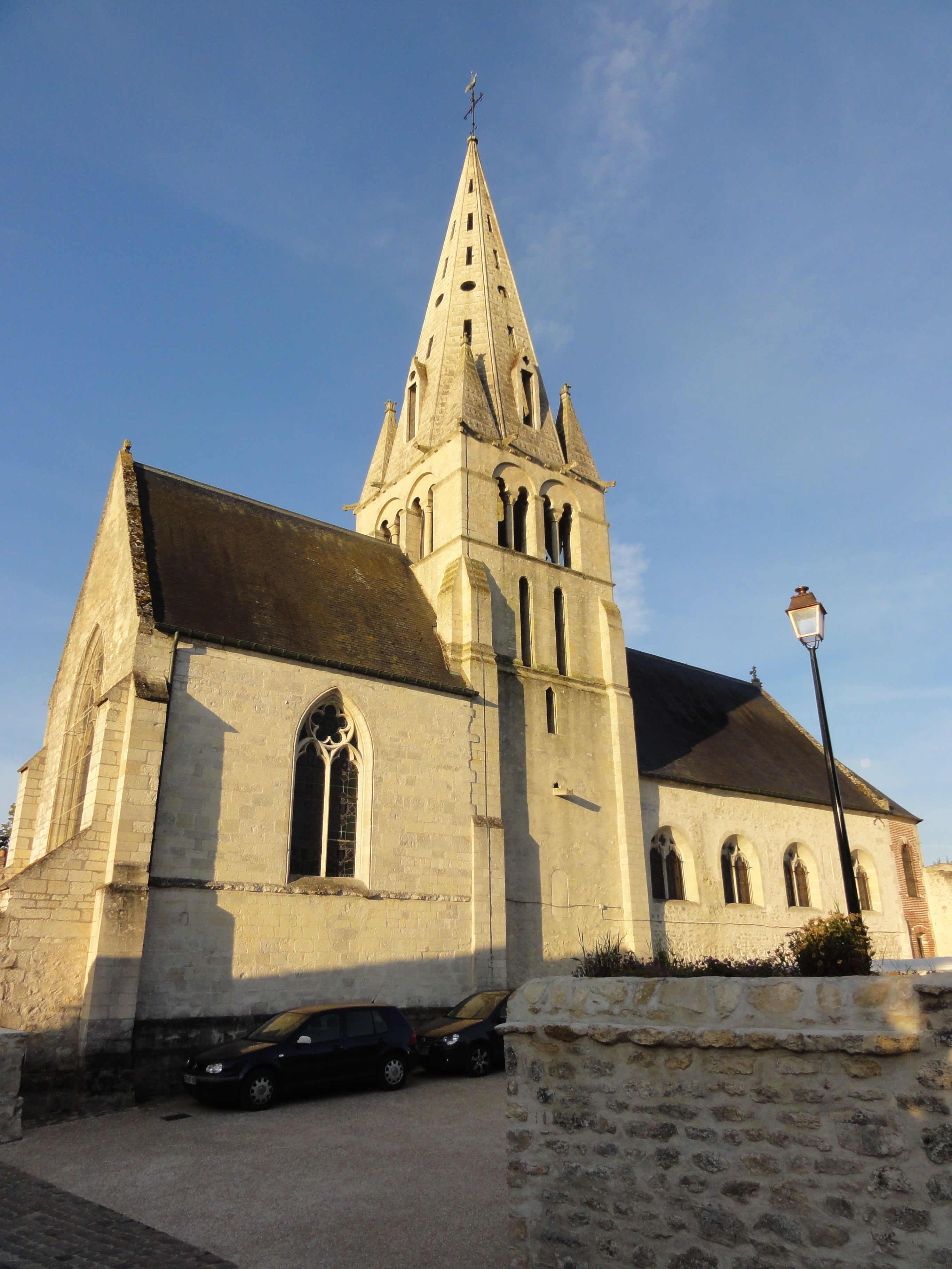 Église Notre-Dame de Chamant (voir titre).